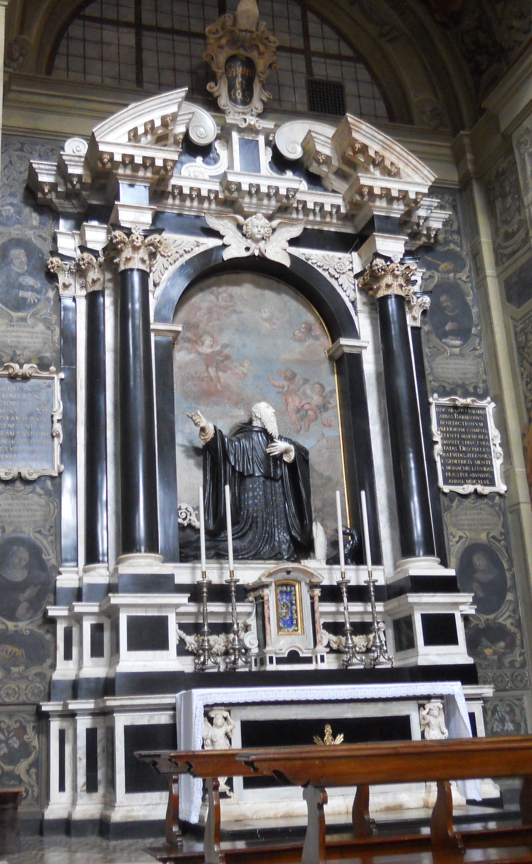 San Faustino maggiore (Brescia) (altare di san benedetto)